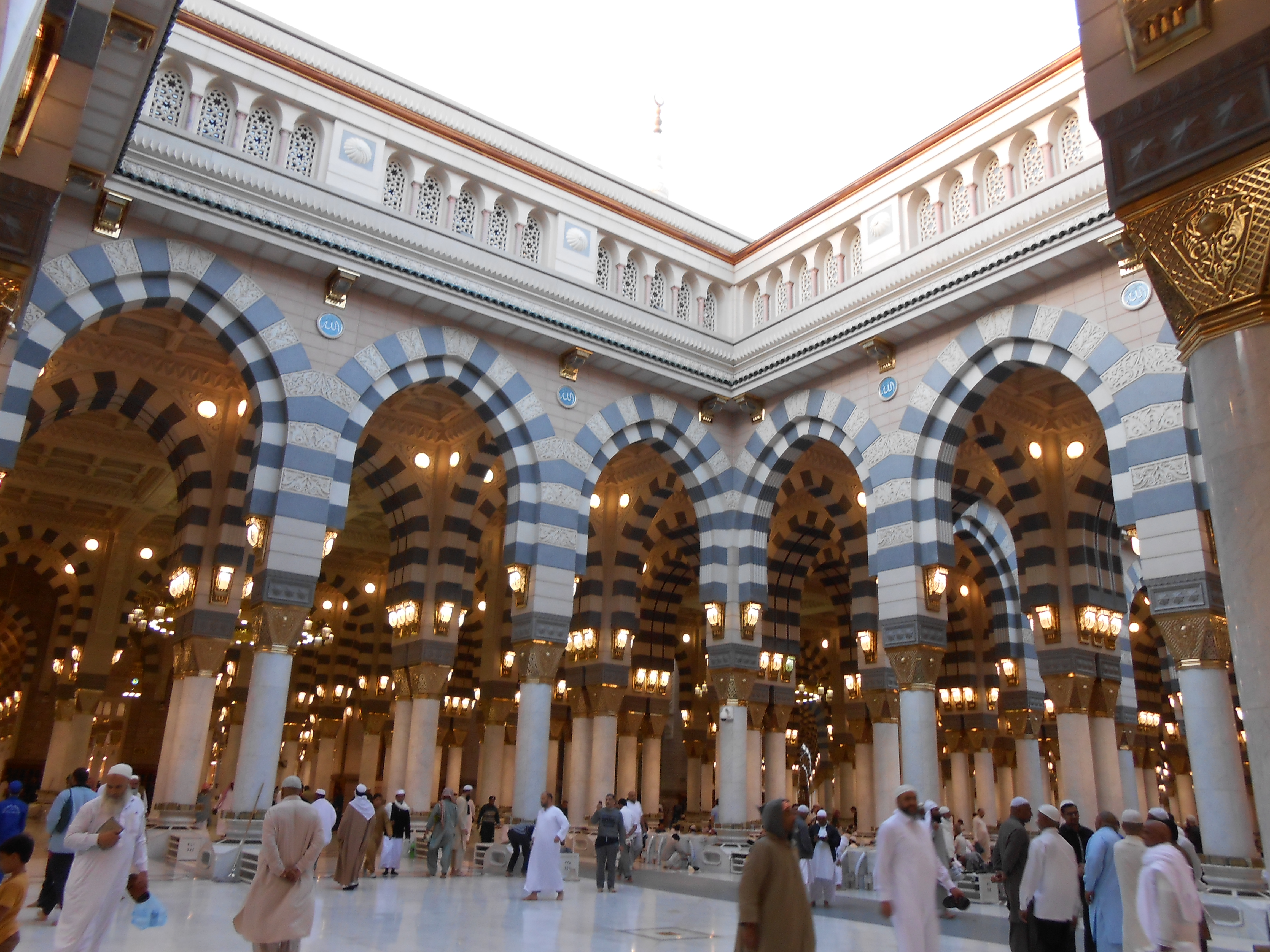 Inside Masjid.e.Nabavi